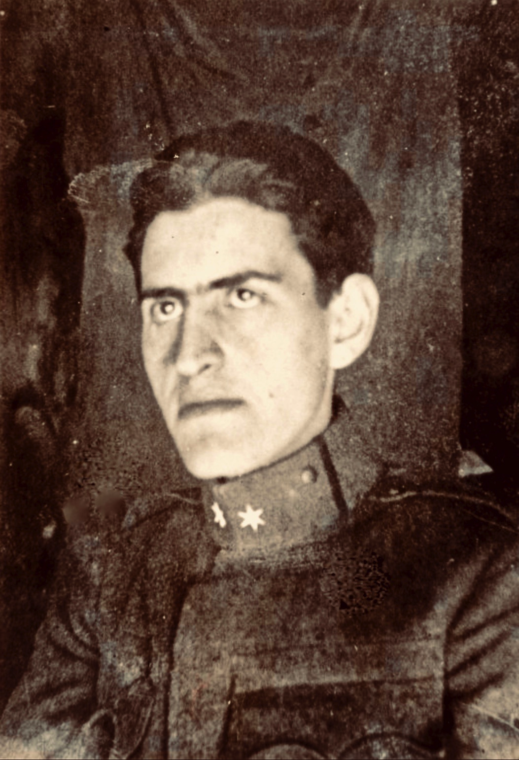 Siegfried Bernfeld (1892–1953), Geburtsname Selig Bernfeld, während des Ersten Weltkrieges in Uniform.